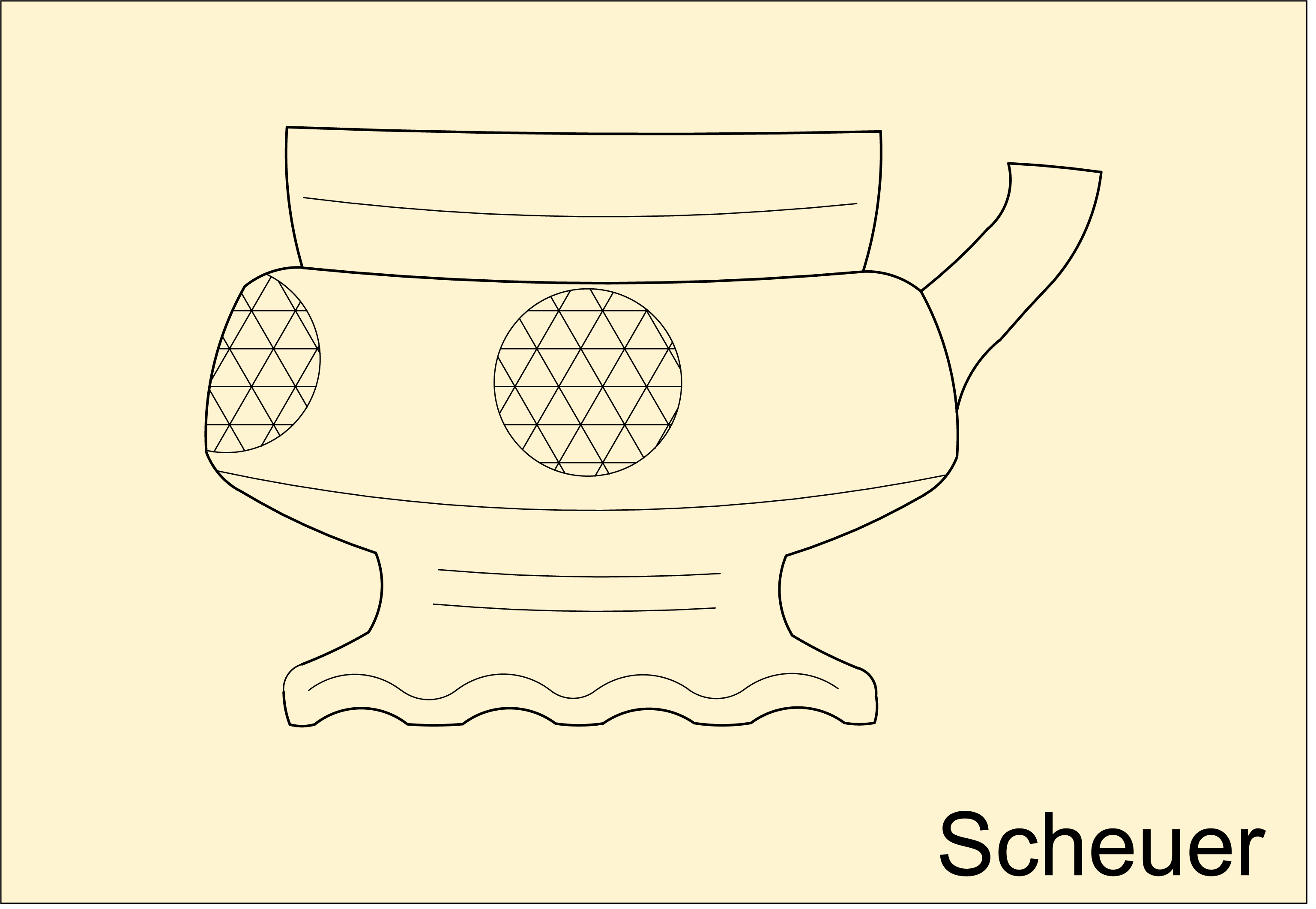 Scheuer, spätgotische Gefäßform. Umzeichnung.